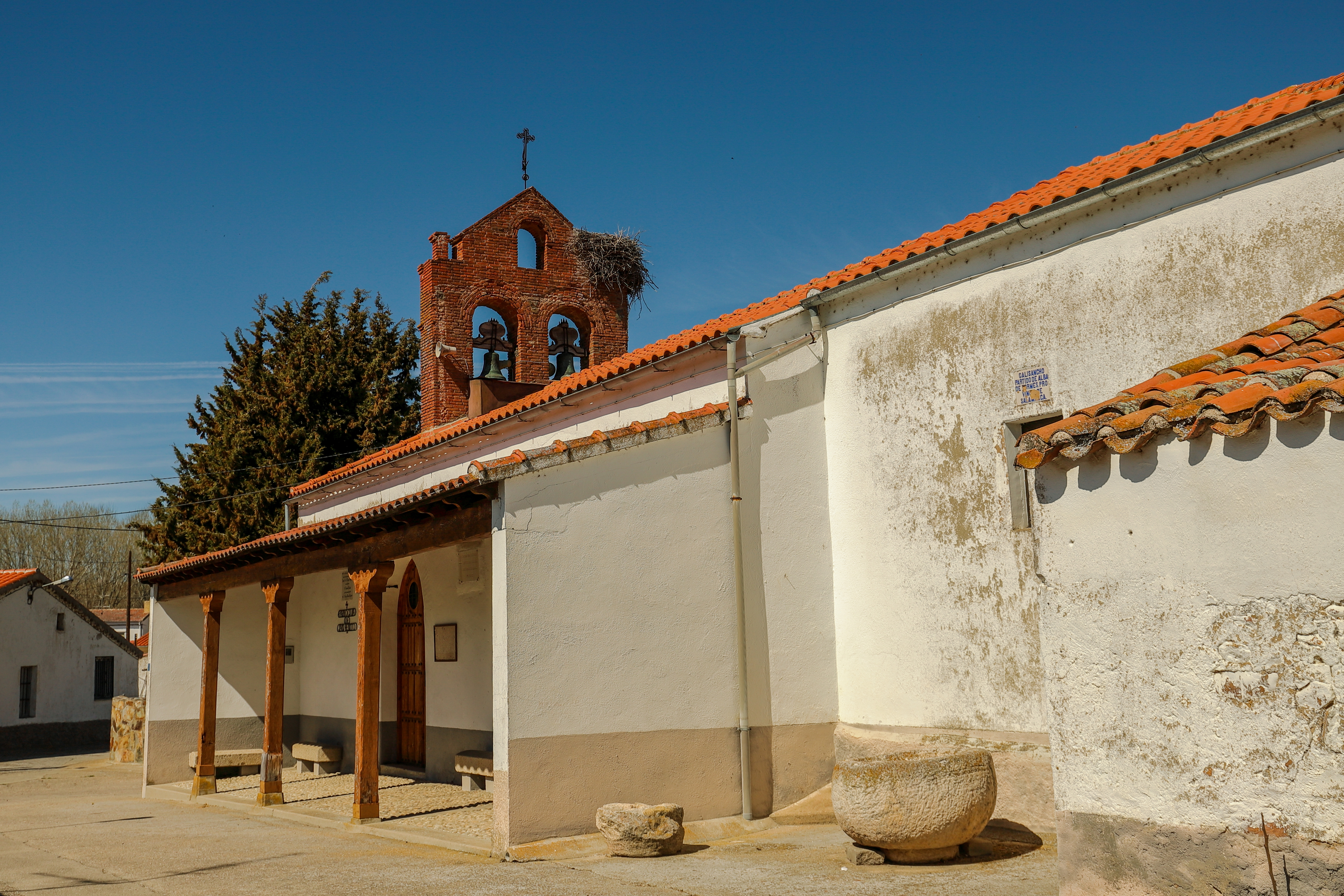 Galisancho es un municipio de la comarca Tierra de Alba, en la provincia de Salamanca.